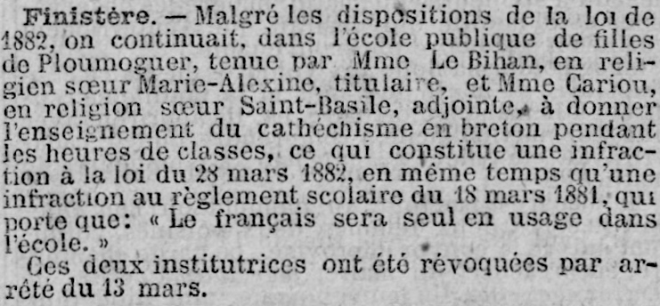 Extrait du journal La Lanterne du 25 mars 1884 concernant le maintien de l'enseignement du catéchisme en breton en dépit de la loi du 28 mars 1882 (qui imposait un enseignement en français) dans l'école dite "publique" (mais tenue par des religieuses) de Ploumoguer.